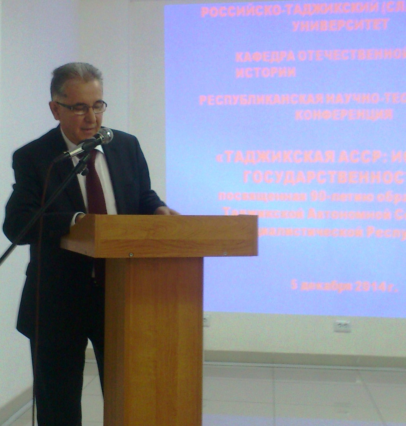 Салихов Нурали Назарович, доктор филологических наук, профессор. Ректор РТСУ. Таджикистан. Тоҷикӣ: Нуралӣ Назарович Cолеҳов, доктори илмҳои филология (2011), профессор (2013), доктори фахрии Донишгоҳи Қазоқистон (2012), Корманди фахрии маорифи Федератсияи Россия (2014).Ректори Донишгоҳи (Славянии) Россияву Тоҷикистон